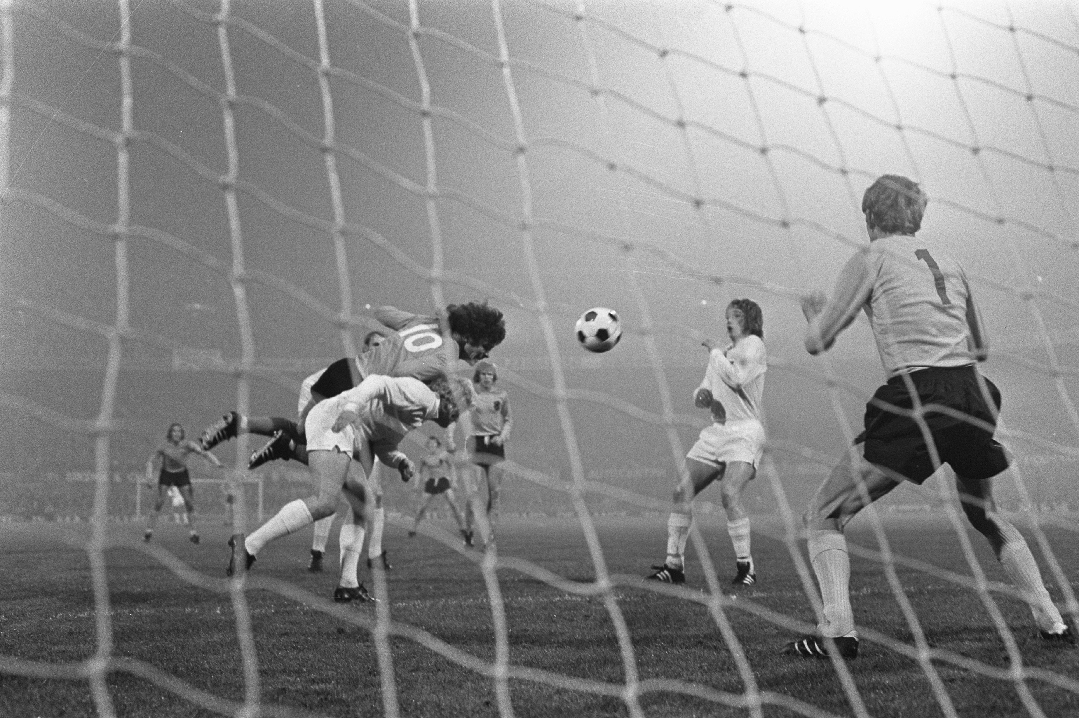 Collectie / Archief : Fotocollectie Anefo Reportage / Serie : [ onbekend ] Beschrijving : Nederland tegen Noorwegen 9-0, Van Hanegem (nummer 10) in aktie Datum : 1 november 1972 Locatie : Nederland, Noorwegen Trefwoorden : sport, voetbal Fotograaf : Peters, Hans / Anefo Auteursrechthebbende : Nationaal Archief Materiaalsoort : Negatief (zwart/wit) Nummer archiefinventaris : bekijk toegang 2.24.01.05 Bestanddeelnummer : 925-9933